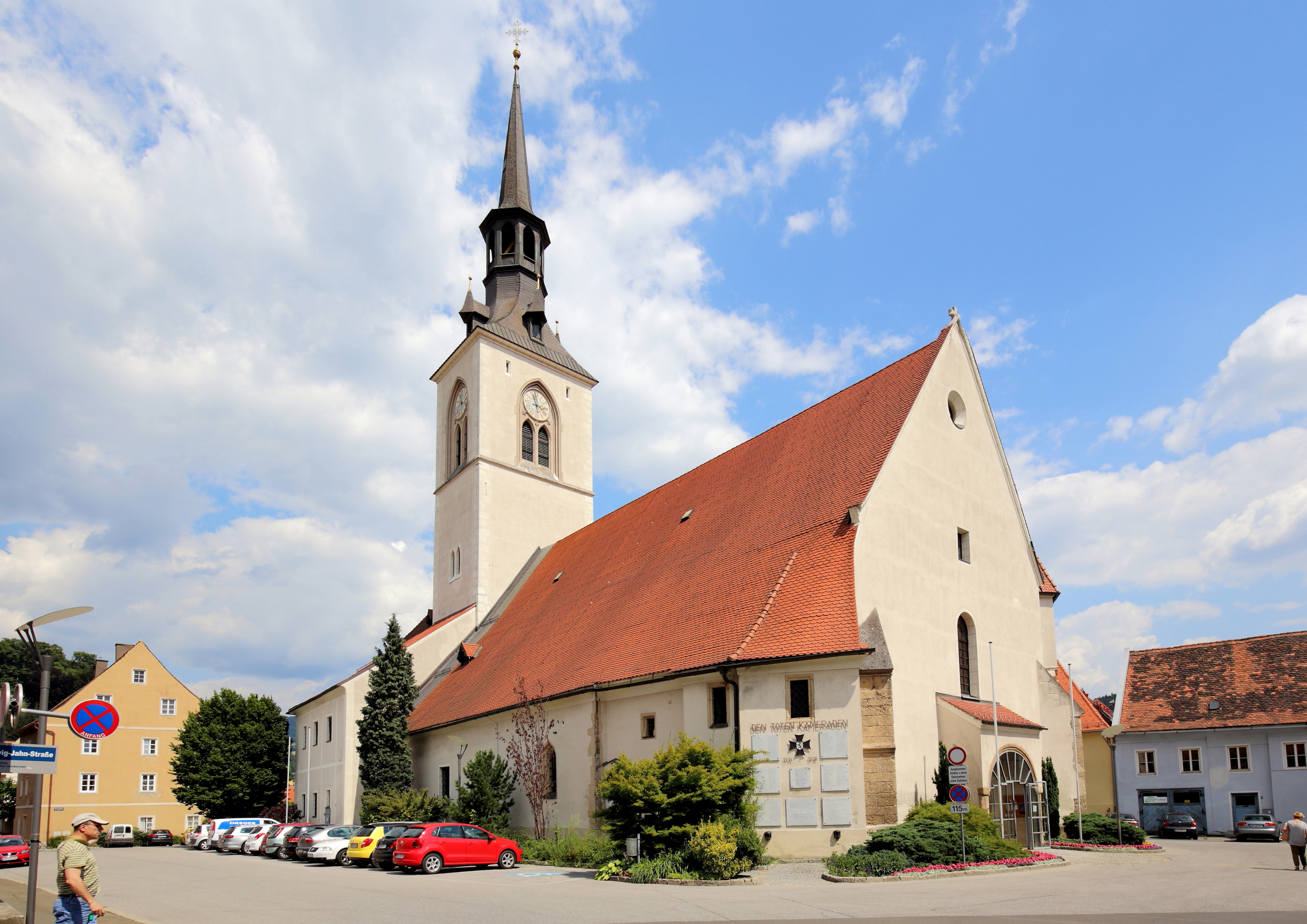 Stadtpfarrkirche Mariae Geburt in der österreichischen Gemeinde Bruck an der Mur im steirischen Bezirk Bruck-Mürzzuschlag.